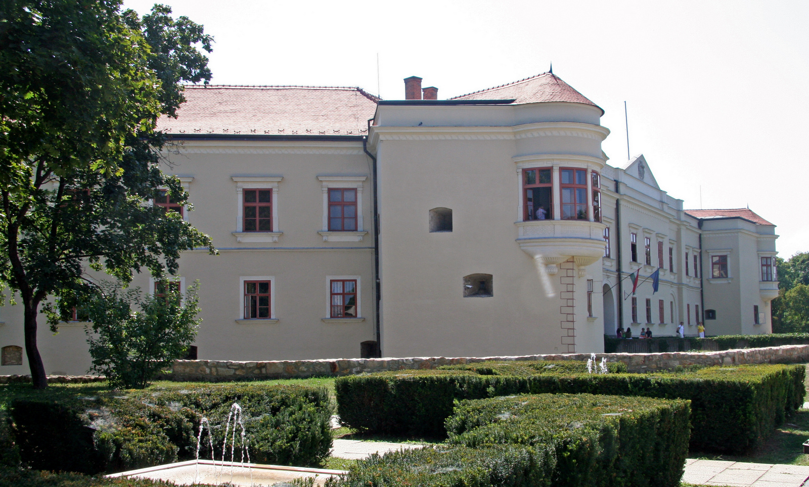 Sárospatak, Rákóczi-vár, főbejárat This is a photo of a monument in Hungary, Identifier: 18070